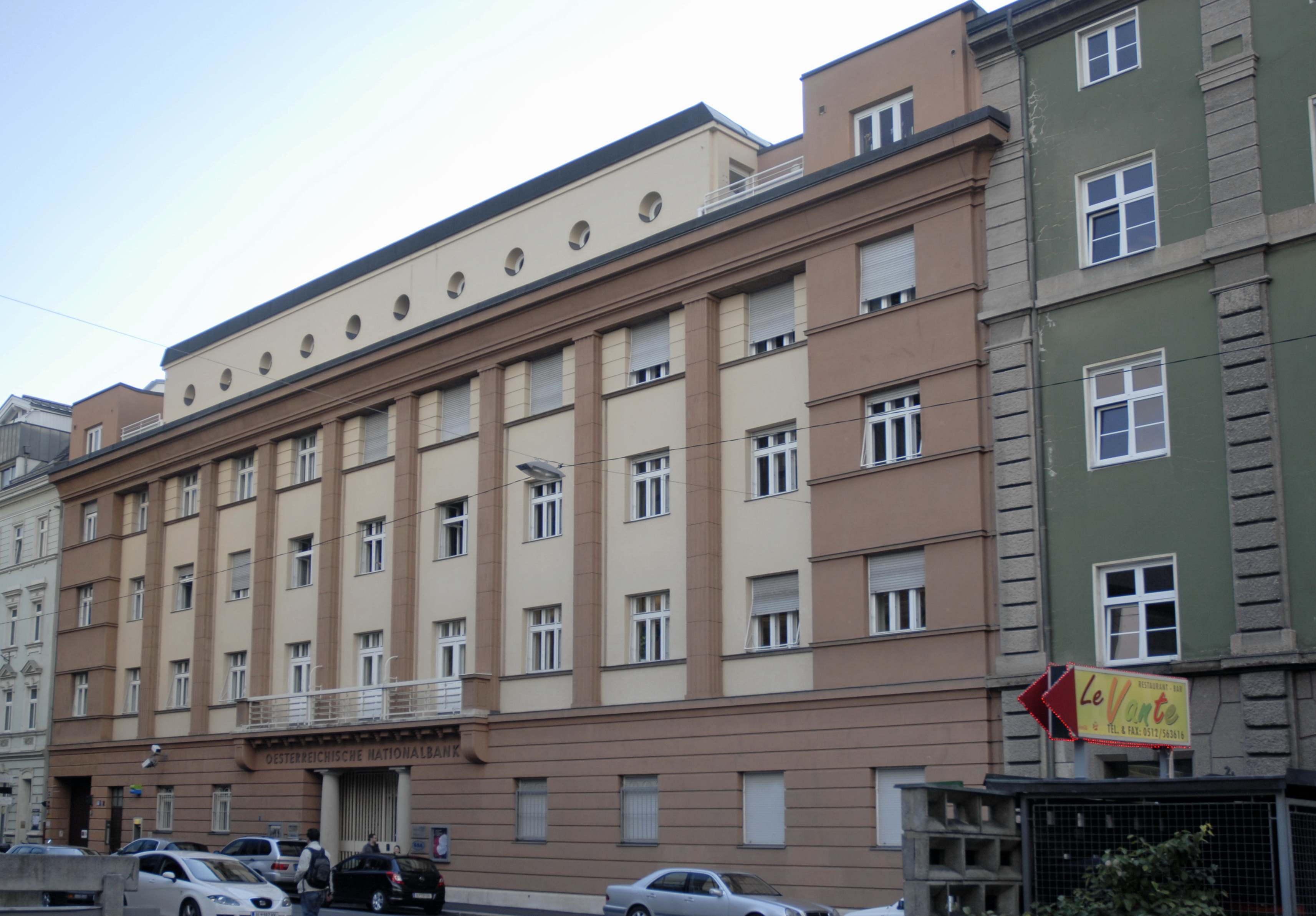 Innsbruck, Filiale der Österreichischen Nationalbank, Adamgasse 2